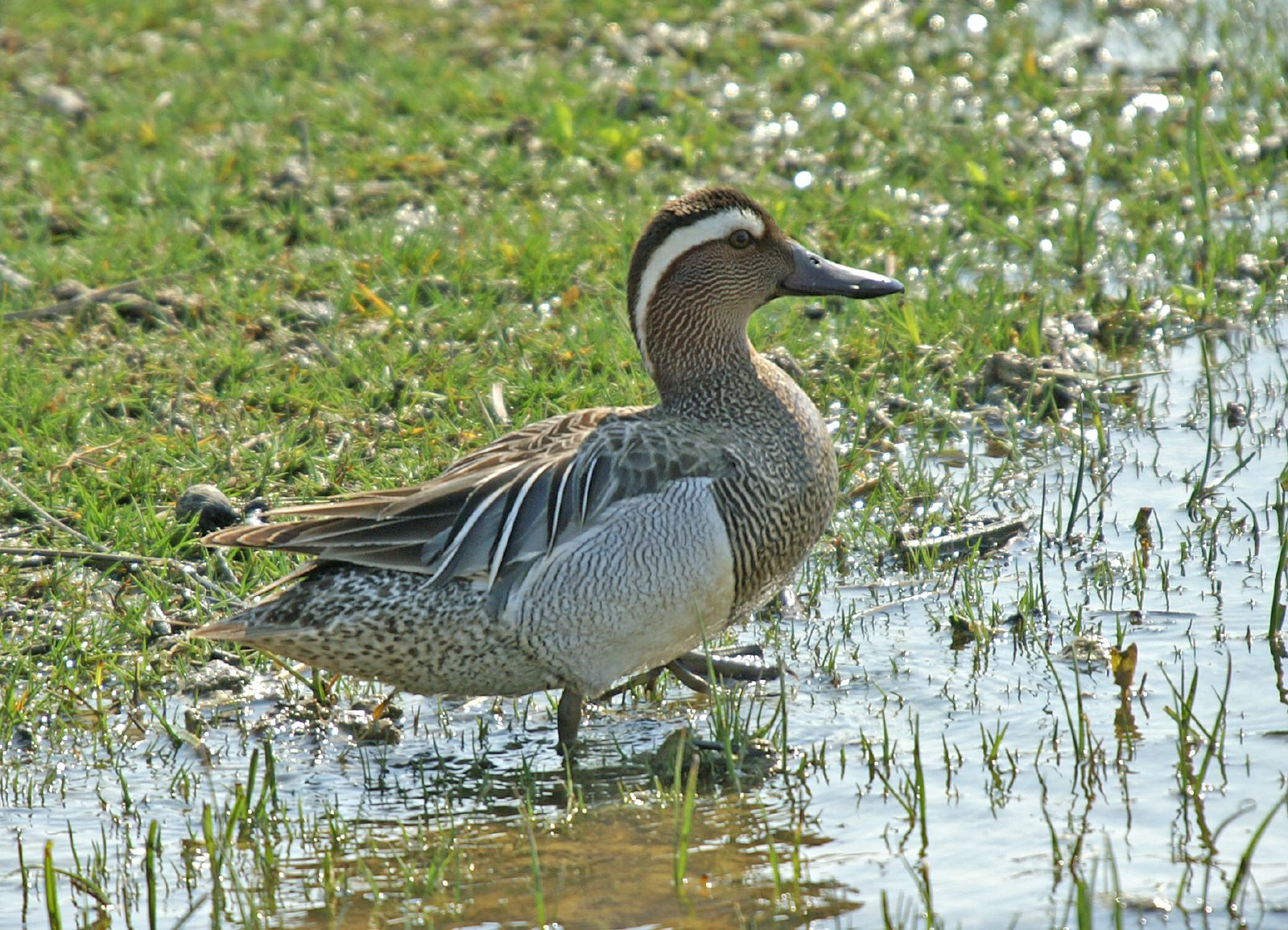 Cerceta carretona / Xarrasclet / Garganey Anas querquedula, Llobregat Delta, Barcelona, Spain